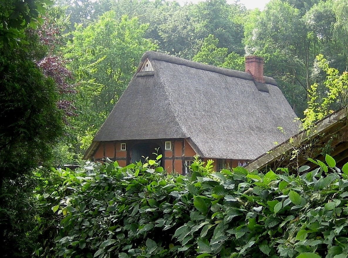 Im Jahre 1989 aus dem Landkreis Diepholz nach Böddenstedt umgesetztes niederdeutsches Hallenhaus (von 1701).